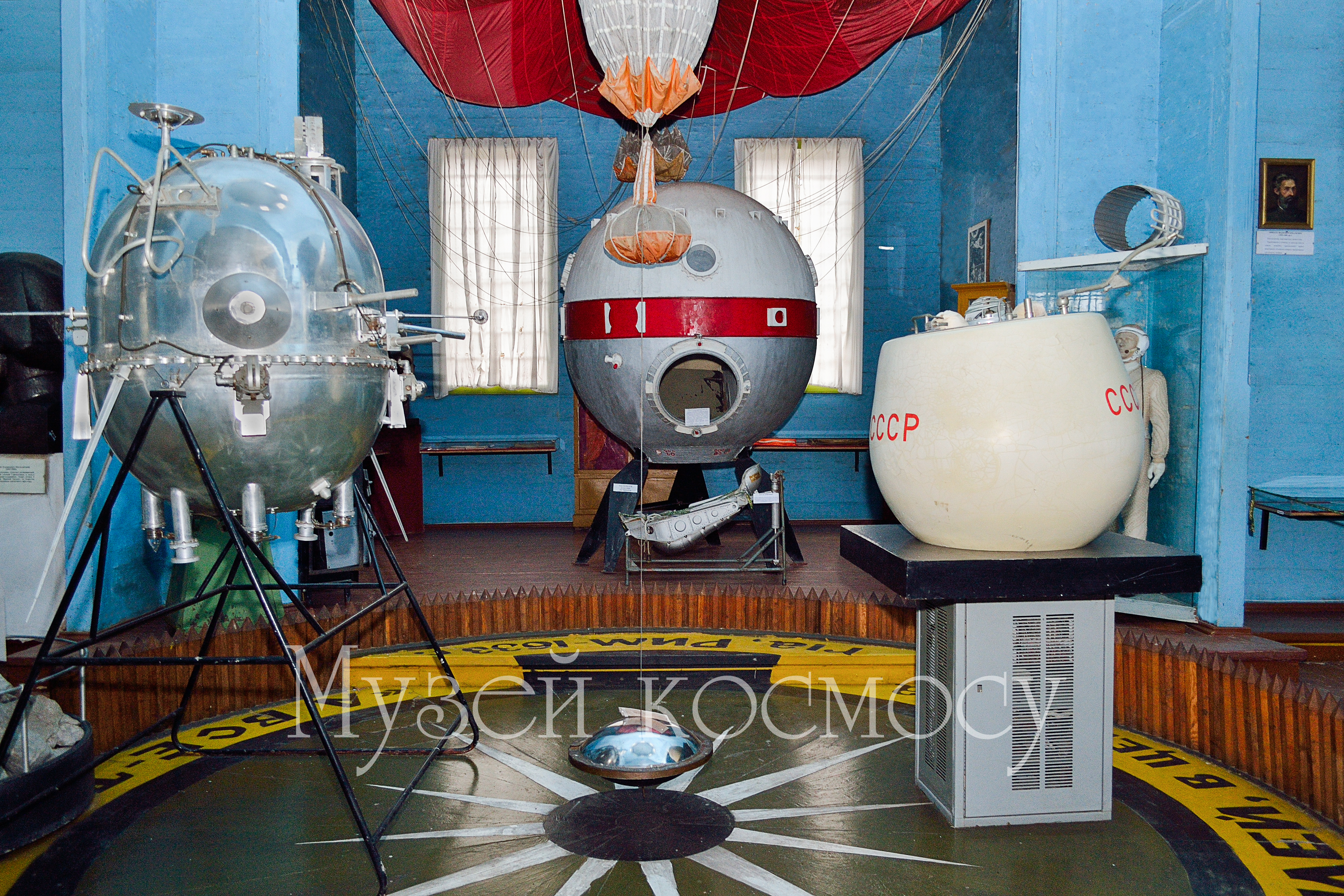 2. Фрагмент експозиції Музею космосу., Музей космосу